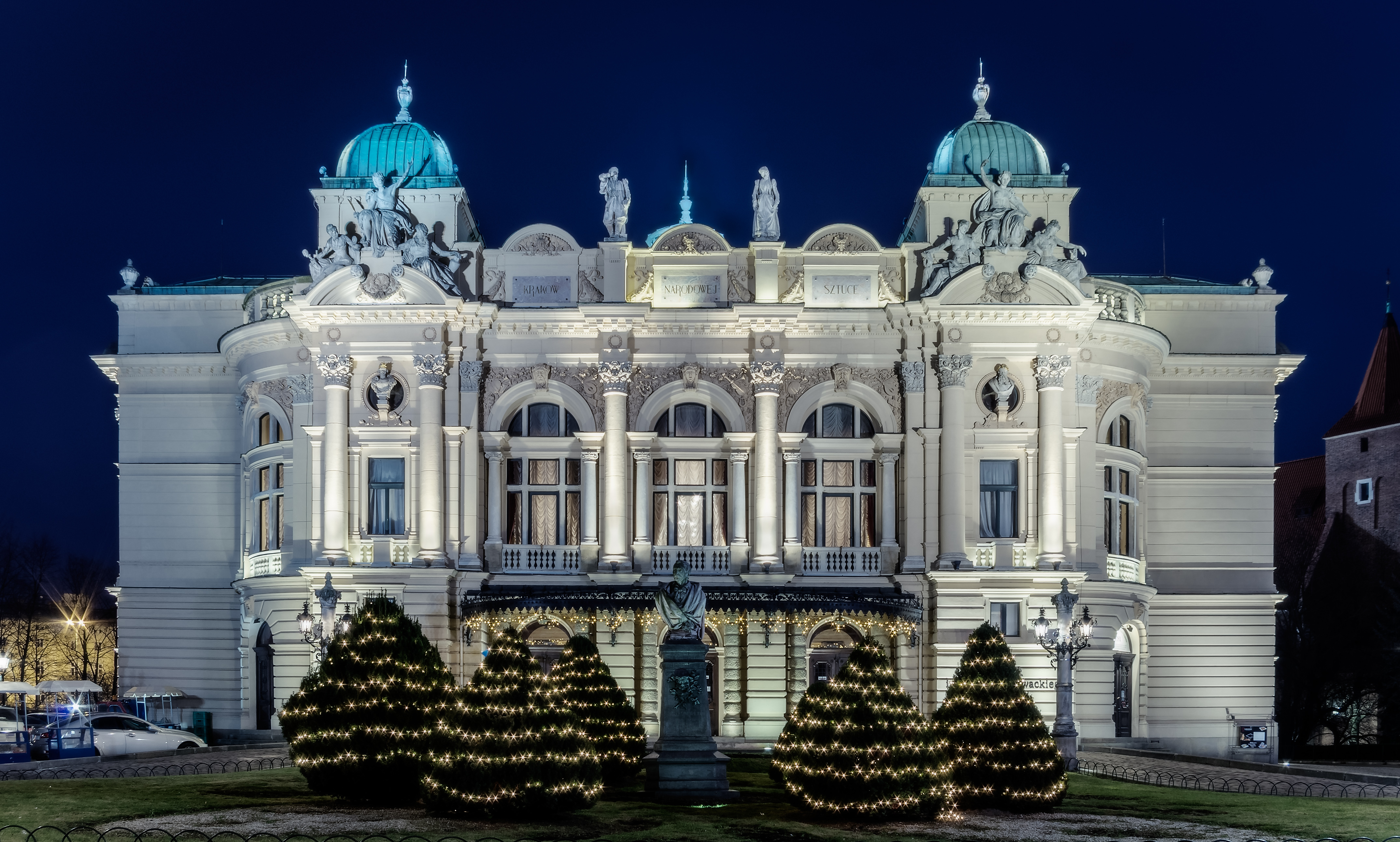 Kraków, Teatr Miejski im. Słowackiego, 1891-1893